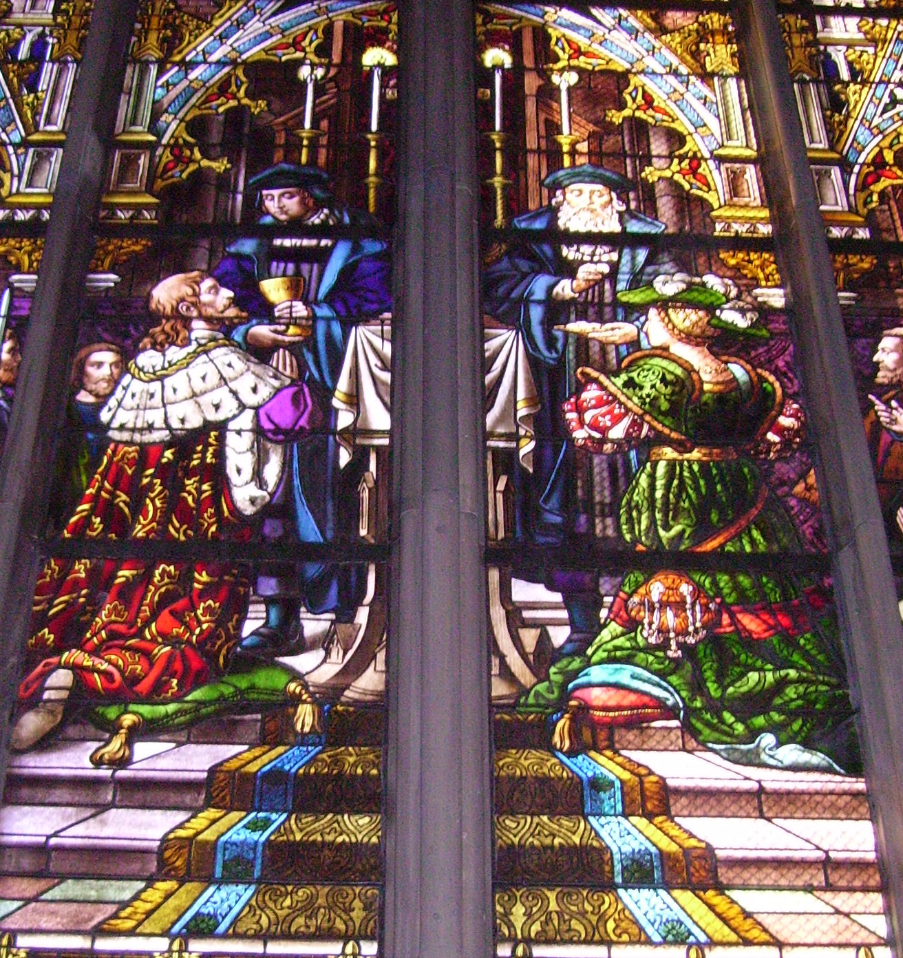 Gedächtniskirche (Memorial Church) in Speyer (Germany), "Im Vorchor der Gedächtniskirche ist das erste Abendmahl 'in beiderlei Gestalt' des Kurfürsten von Brandenburg mit seiner Frau im Jahr 1526 dargesrellt." (aus Anke Elisabeth Sommer: Glasmalereien der Protestantischen Landeskirche der Pfalz. Verlag Schnell und Steiner, Regensburg 2007, S. 64), mit Kelch: Georg Buchholzer, mit Brot in der Hand: Matthias von Jagow